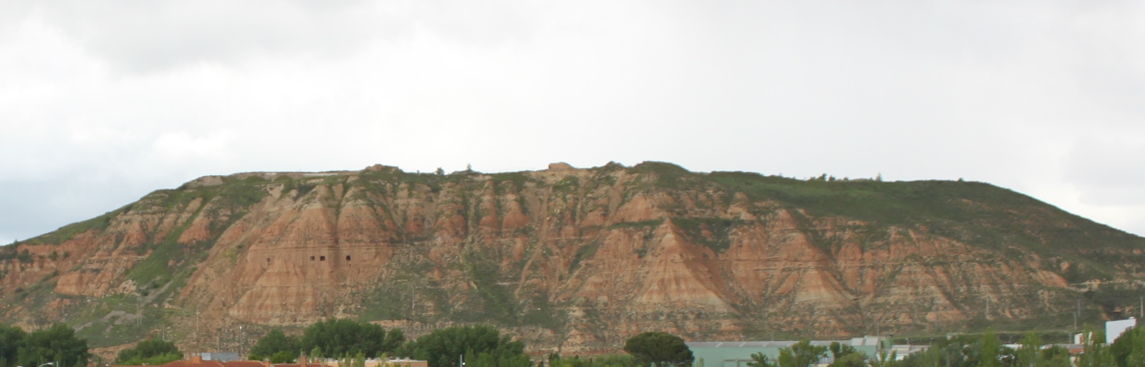 El Monte Cantabria de Logroño.